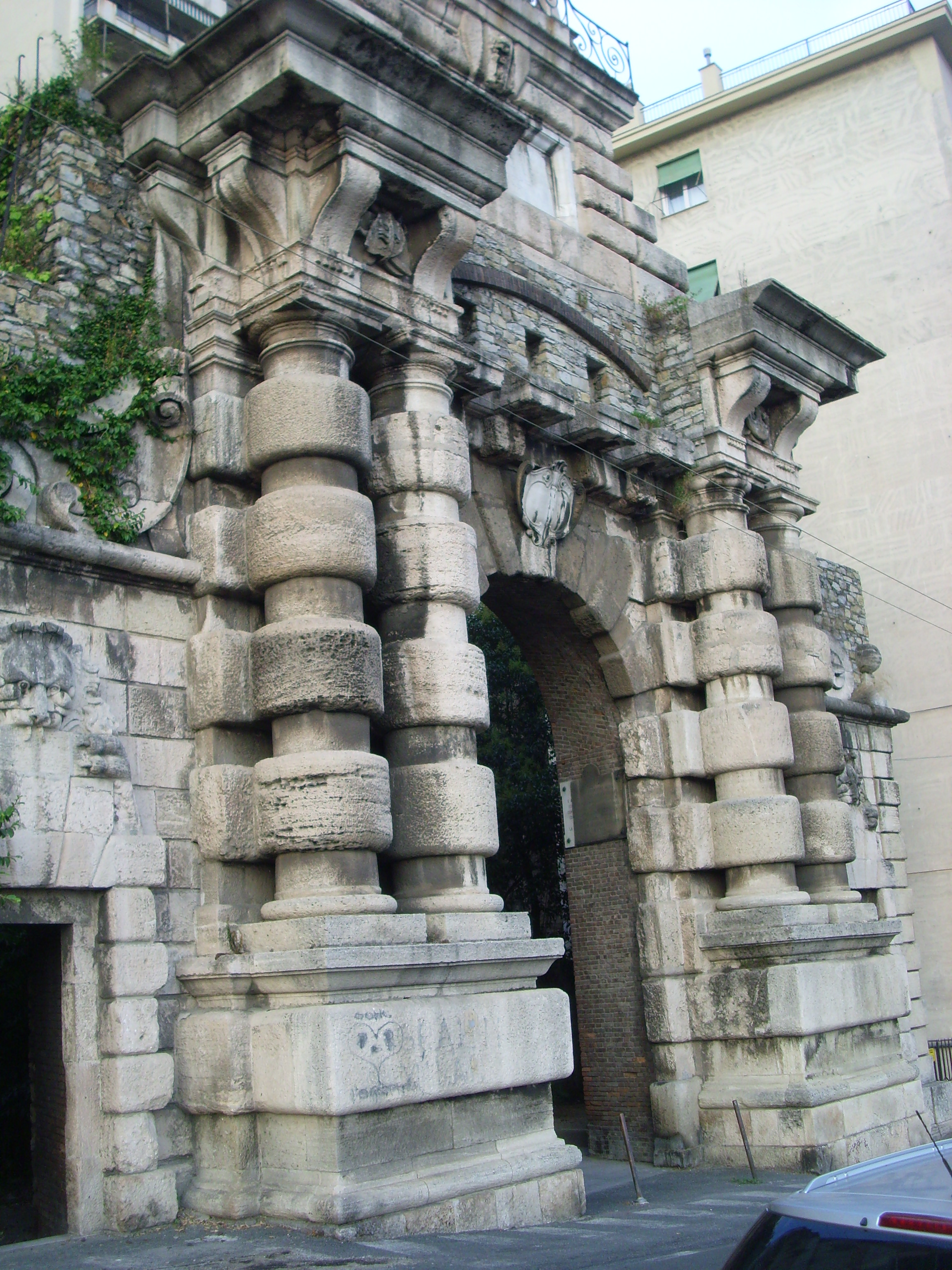 Porta Pila a Genova, ricostruita sopra la stazione di Genova Brignole